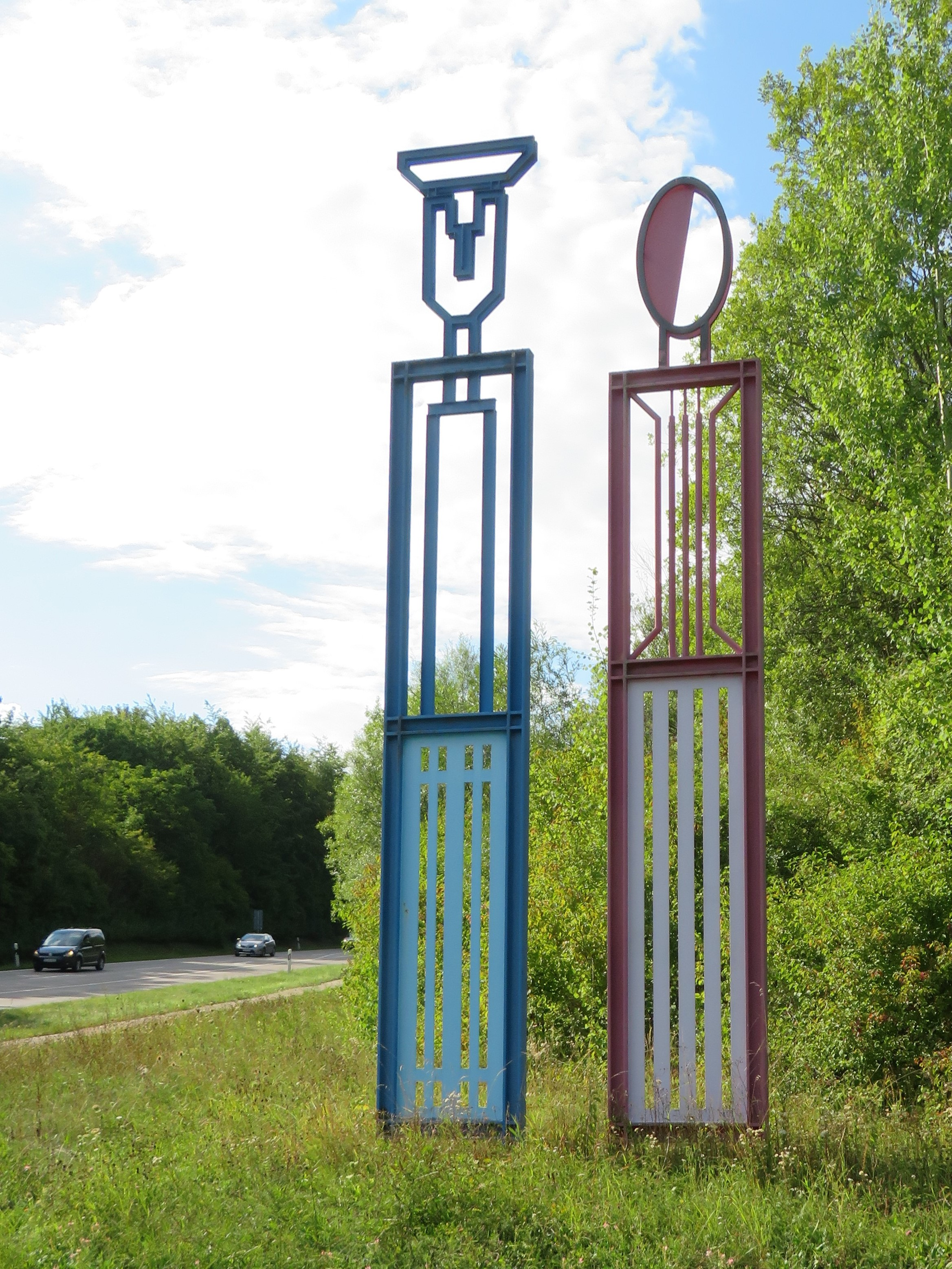 Stahlskulptur mit dem Titel "Paar" von Bertram Bartl (* 1956) - Kunst im öffentlichen Raum Ulm-Eselsberg